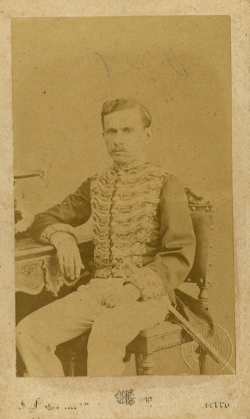 J Alfredo 1888